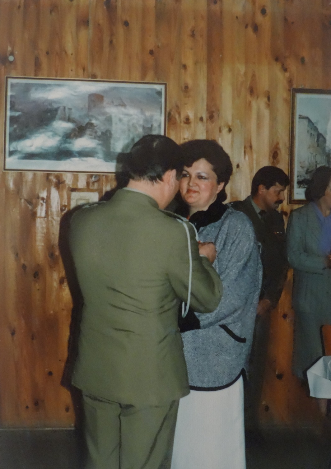 Dowódca 45 Batalionu Medycznego ppłk lek. Antoni Kalinowski odznacza pielęgniarkę za wzorową pracę zawodową w batalionie